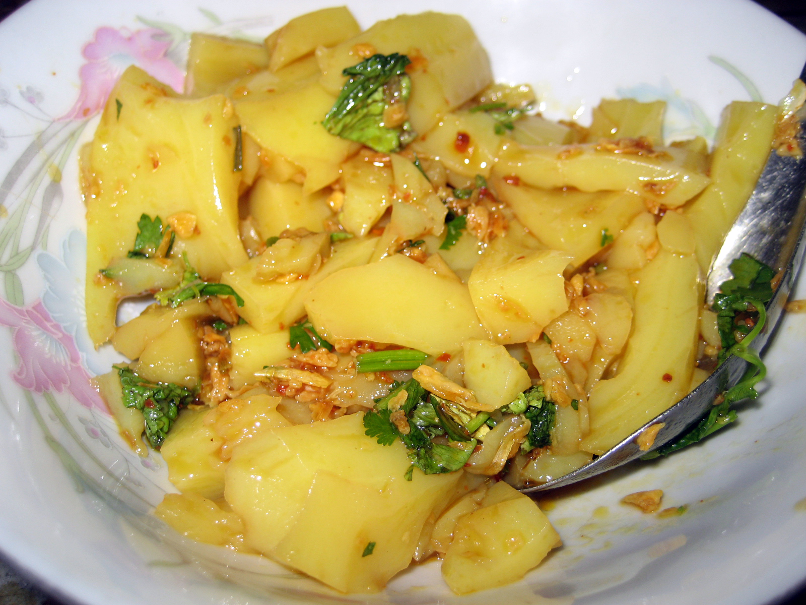 Yangon, Myanmar - Shan tofu salad